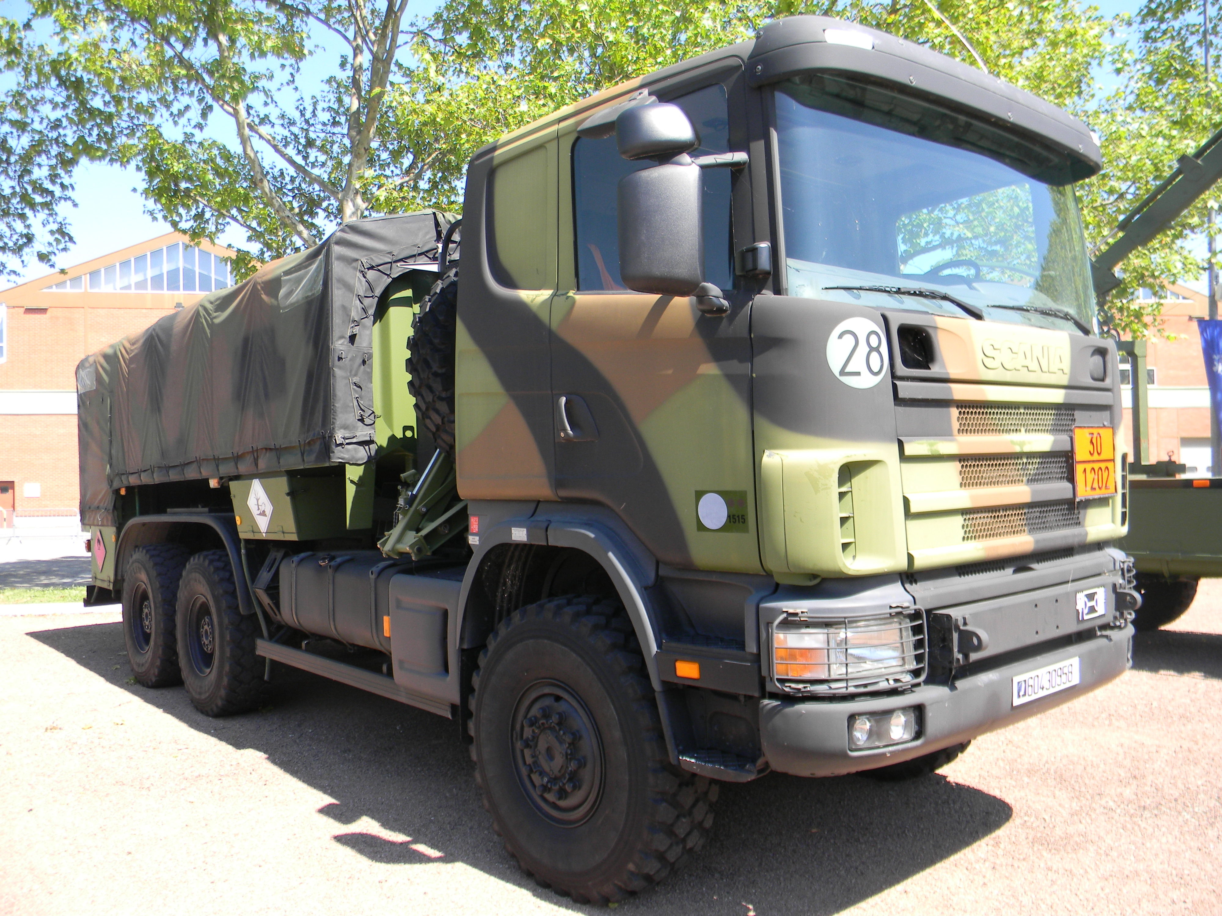 Scania CCP10 de la compagnie de commandement et de logistique du 7e régiment du matériel pendant les journées portes ouvertes du quartier général Sabatier à Lyon le 15 et 16 juin 2013.